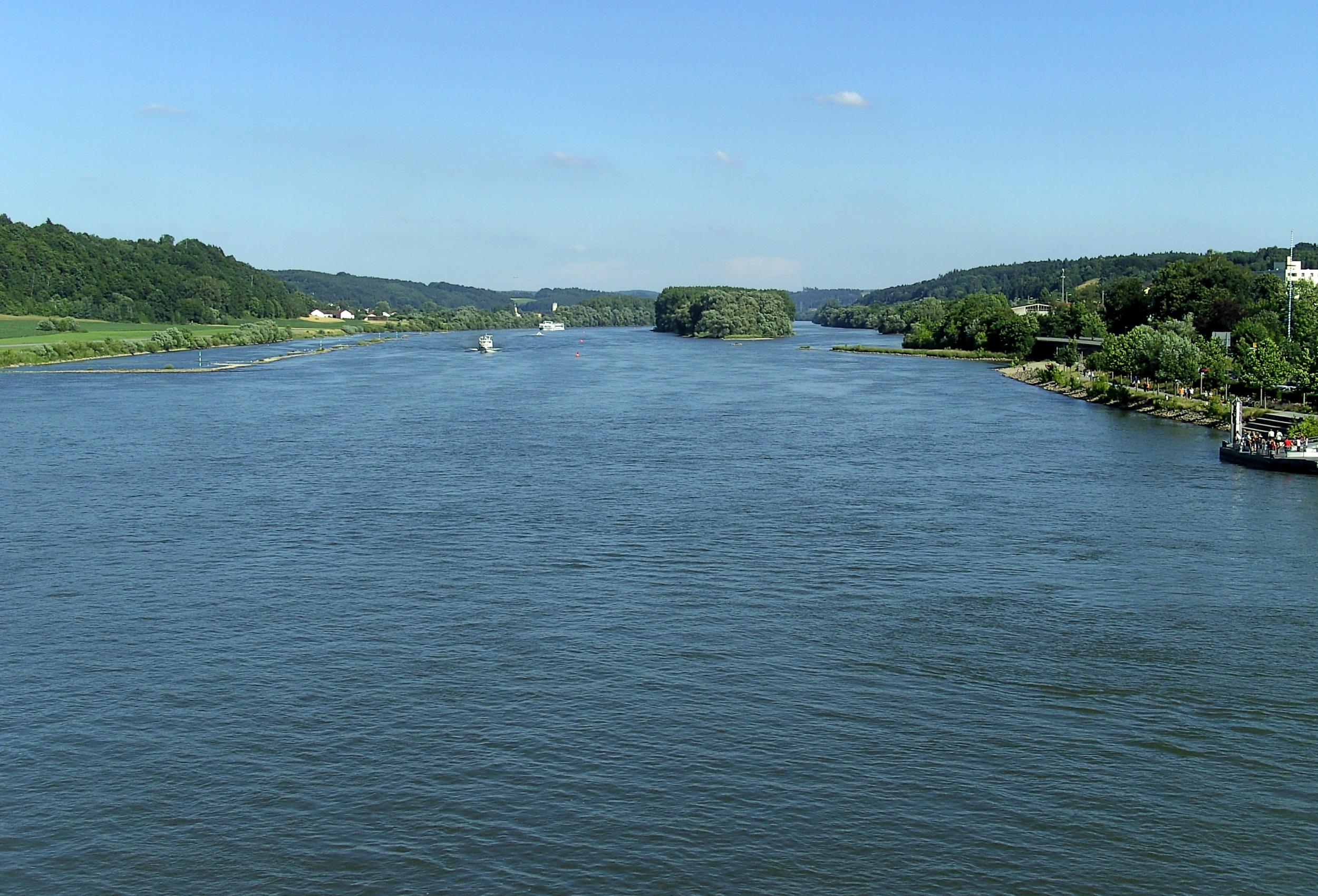 Die Donau in Vilshofen.